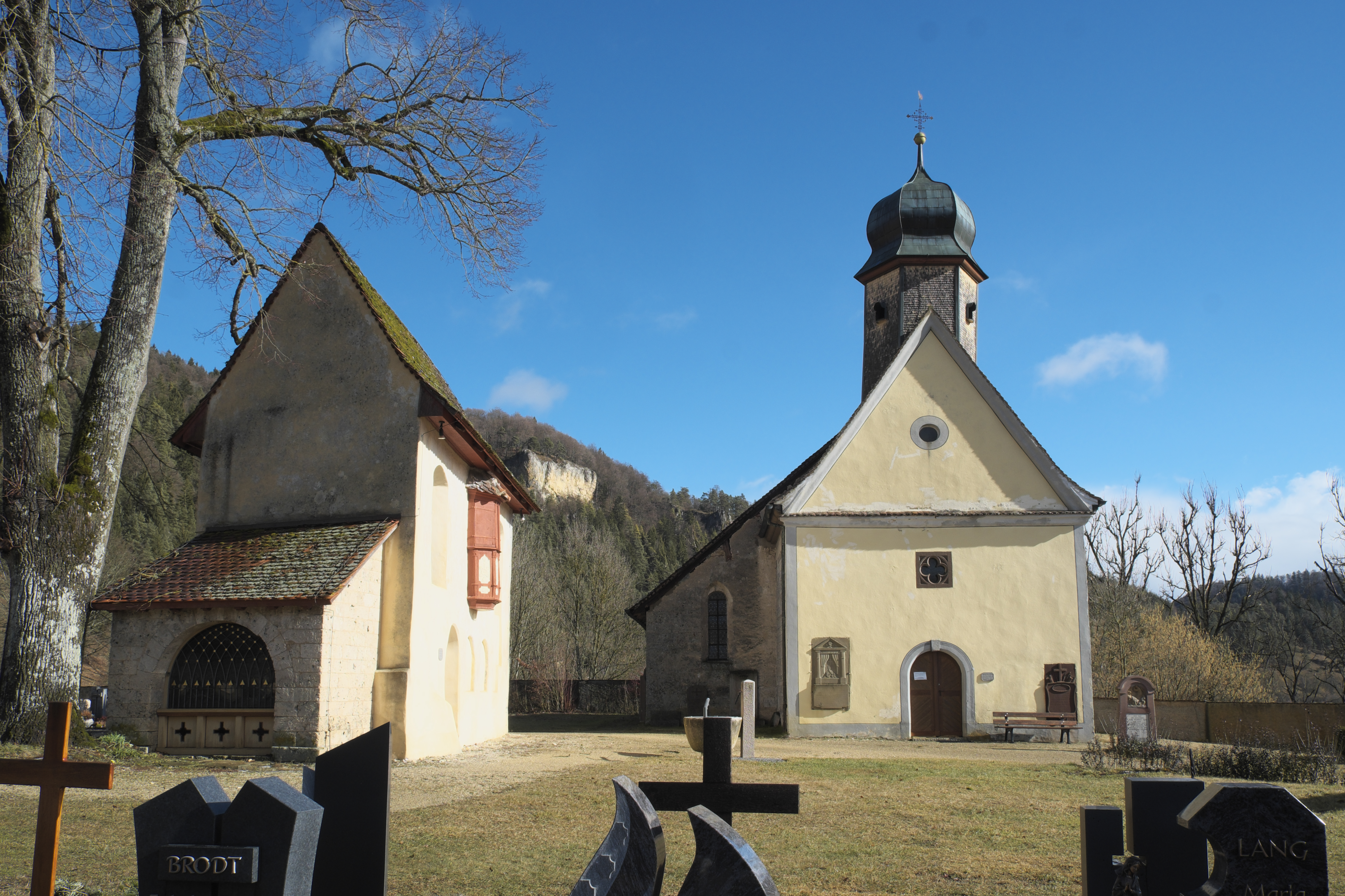 Friedhofskirche, ehemalige Pfarrkirche, St. Gallus in Mühlheim an der Donau im Landkreis Tuttlingen (Baden-Württemberg/Deutschland), links Veitskapelle